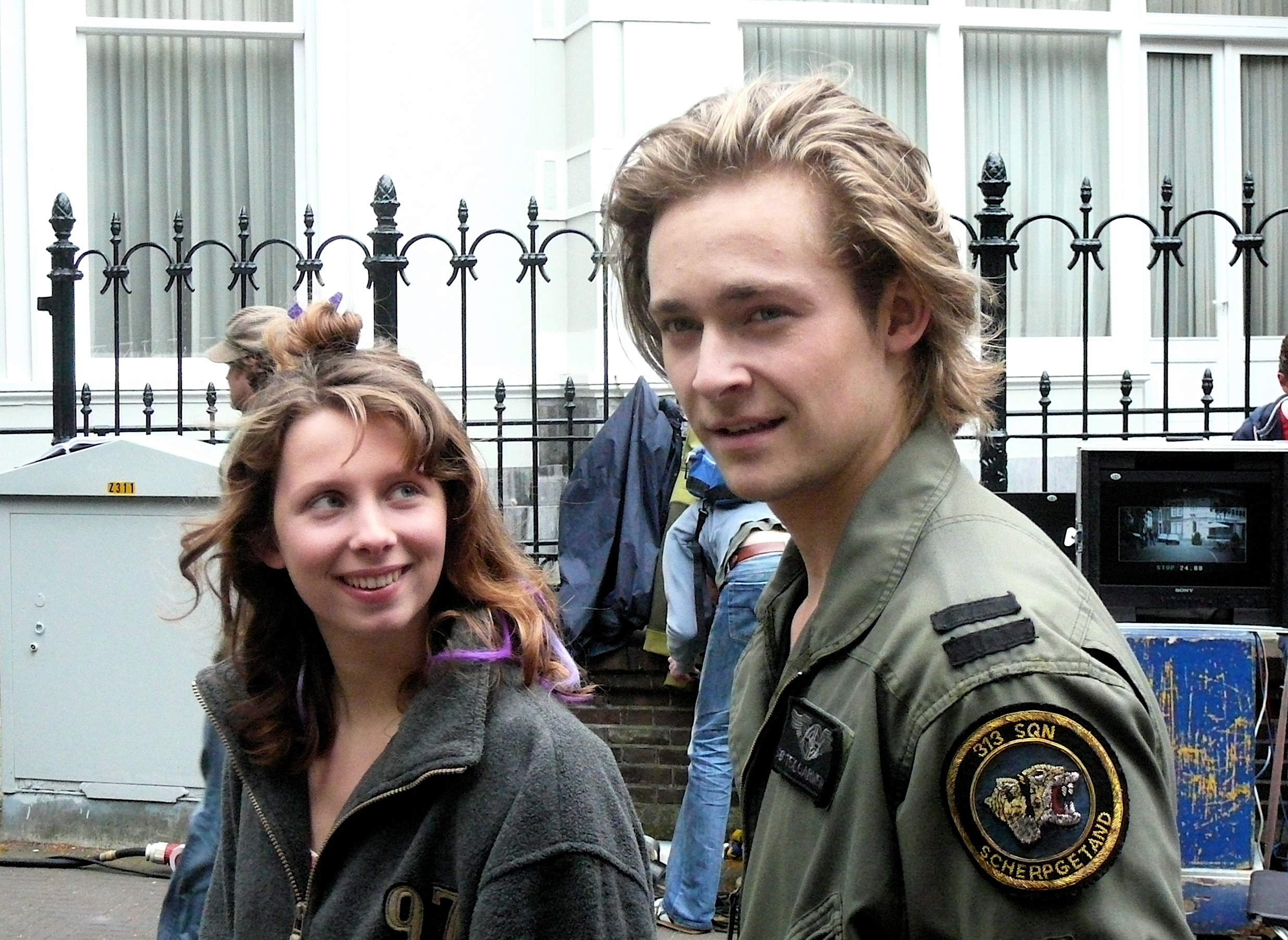 Bennie (Matthijs van Sande Bakhuyzen) en Gini (Loïs de Jong) -- Matthijs Nicolaas van de Sande Bakhuyzen (Amsterdam, 16 oktober 1988) is een Nederlands acteur. -- Loïs Dols de Jong (Amsterdam, 13 februari 1990) is een Nederlandse actrice.